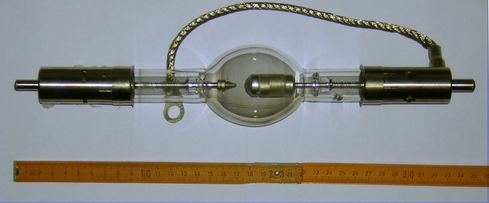 JPEG Version von :Bild:Os_xbo_maßst.png (1/10 Dateigröße) Motiv: Kurzbogenlampe mit Maßstab Hersteller: Osram Technische Daten: Typ: XBO 3000W/HS OFR Brennspannung: 30 V Zündspannung: 36 kV Lampennennstrom: 100 A Stromsteuerbereich: 70 - 110 A Mindestkühlluftstrom: 6 m/s Brennlage: senkrecht: ±30° waagrecht: ±30° mittlere Lebensdauer: senkrecht: 1500 h waagrecht: 1200 h Aufnahmedatum: 13.12.2004